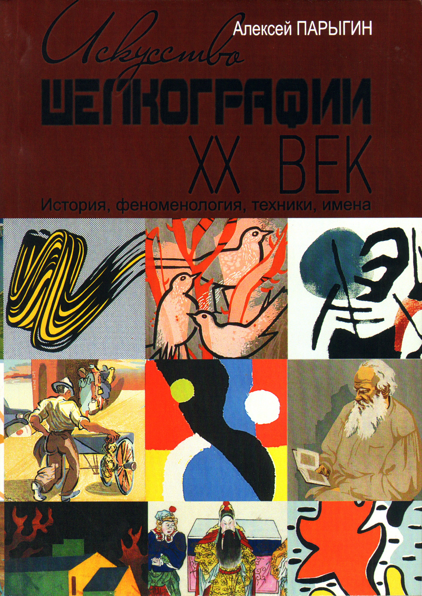 Обложка книги по истории шелкографии — печатной техники используемой художниками